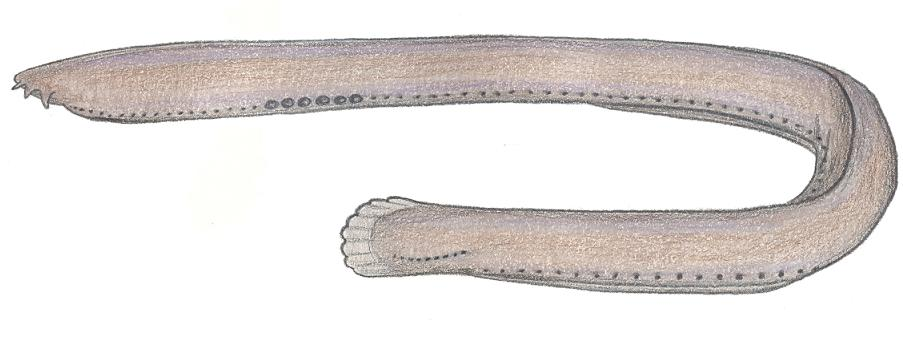 Eptatretus springeri (Bigelow et Schroeder, 1952)